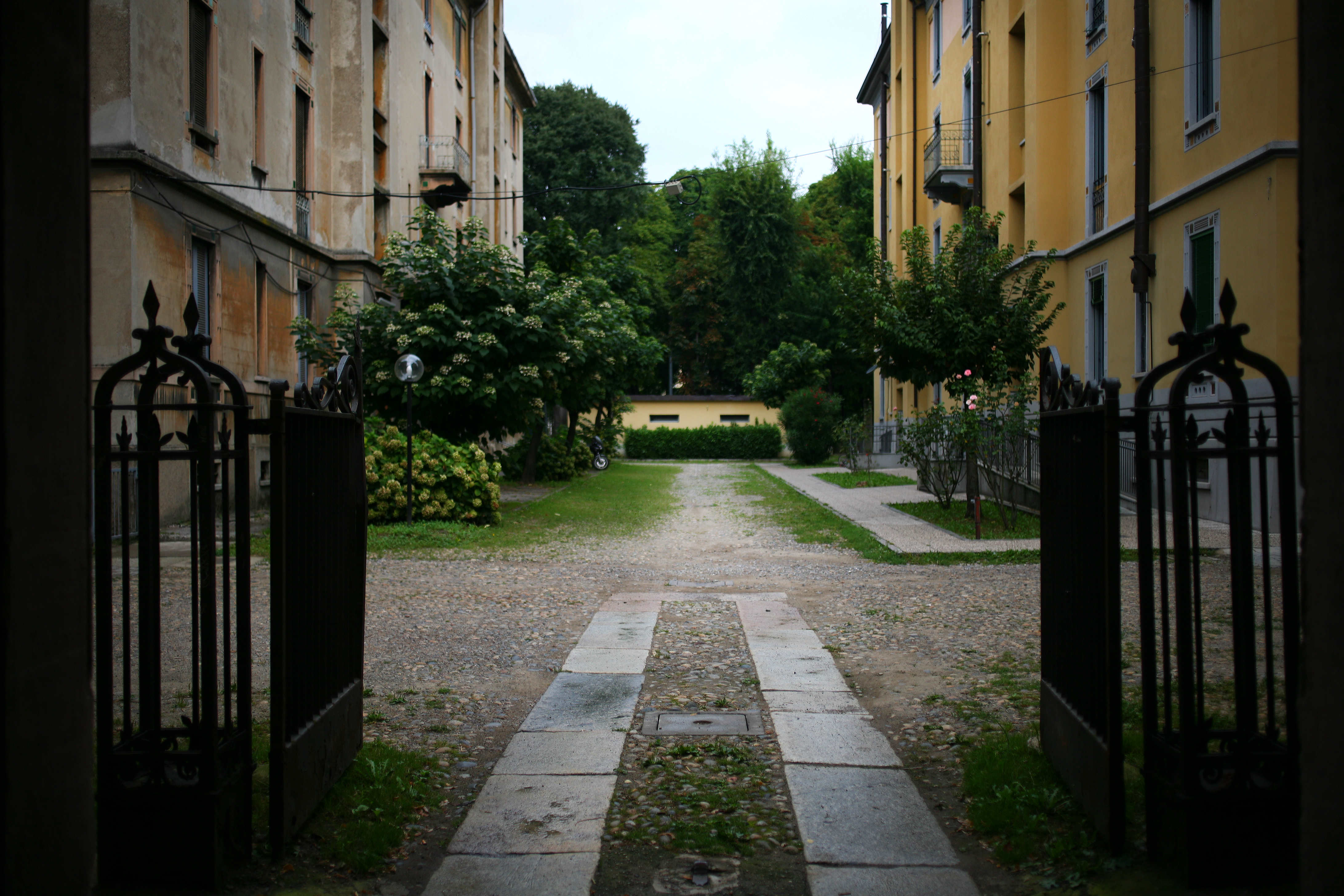 Primo quartiere popolare di via Solaro (oggi via Solari) a Milano, edificato nel 1906 dall'architetto Giovanni Broglio per conto della Società Umanitaria